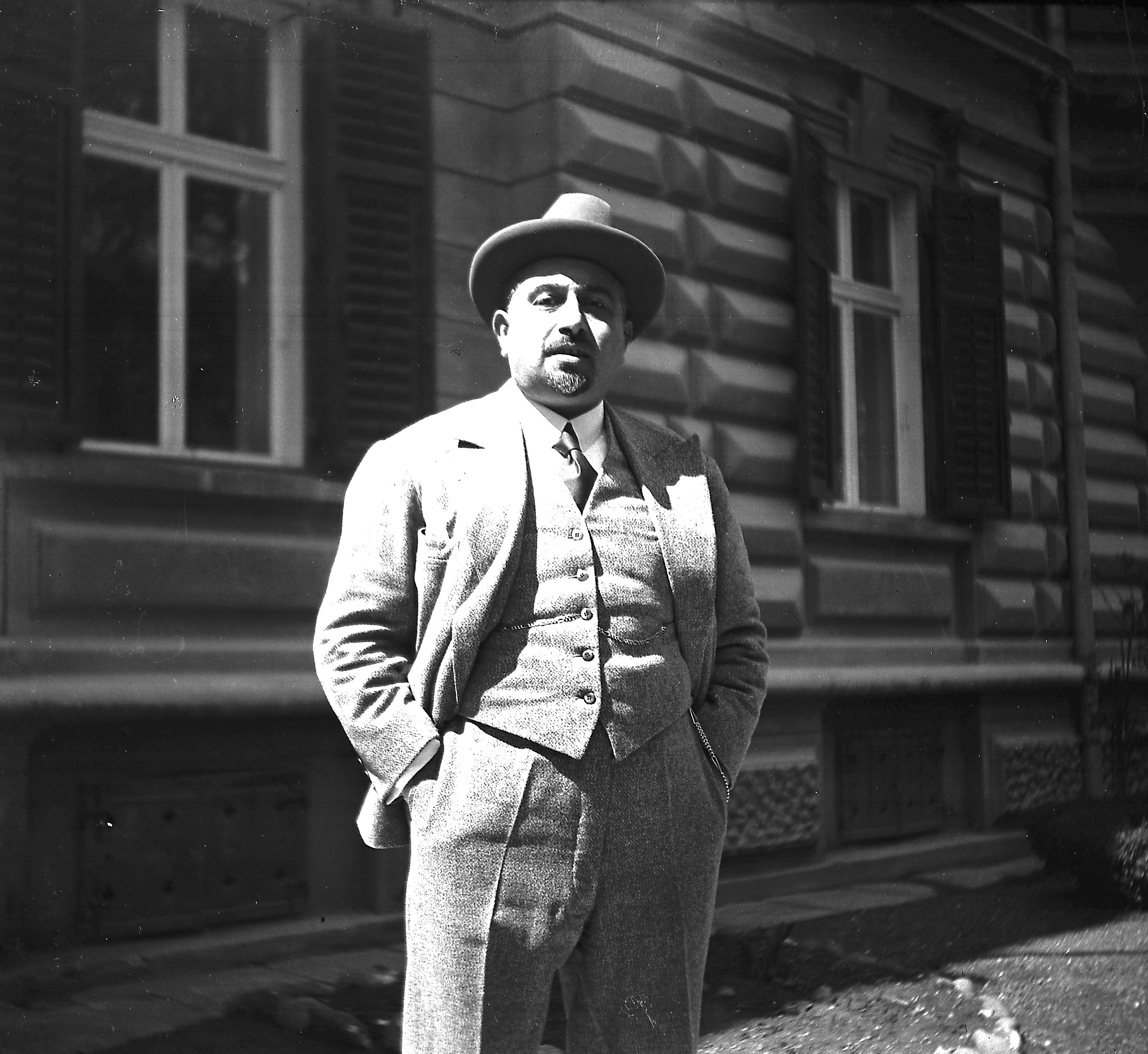 fondo Eugenio Miozzi, Università Iuav di Venenzia, SBD-Archivio Progetti.